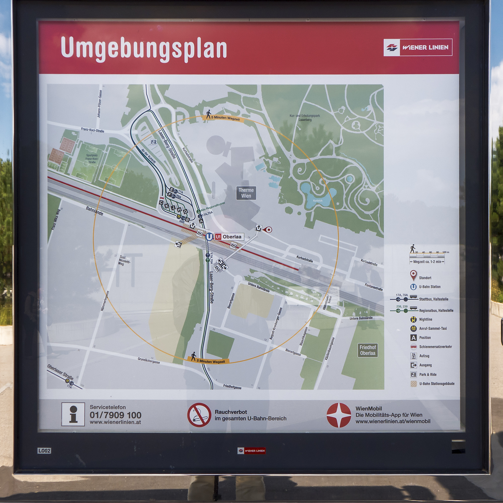 U-Bahn-Station Oberlaa der Linie U1 in Wien 10